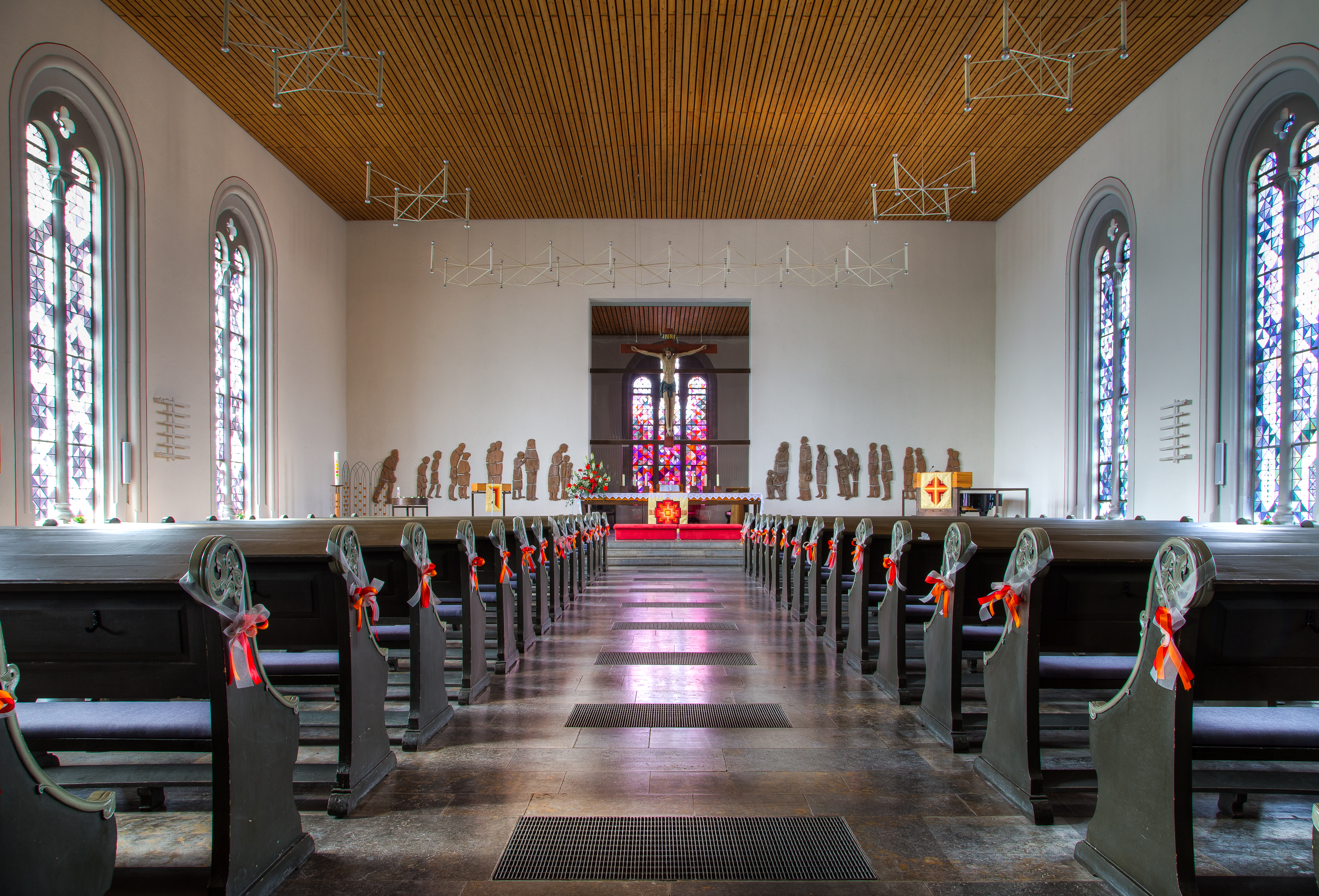 Evangelische Stadtkirche Grünberg, Landkreis Gießen in Hessen, Deutschland